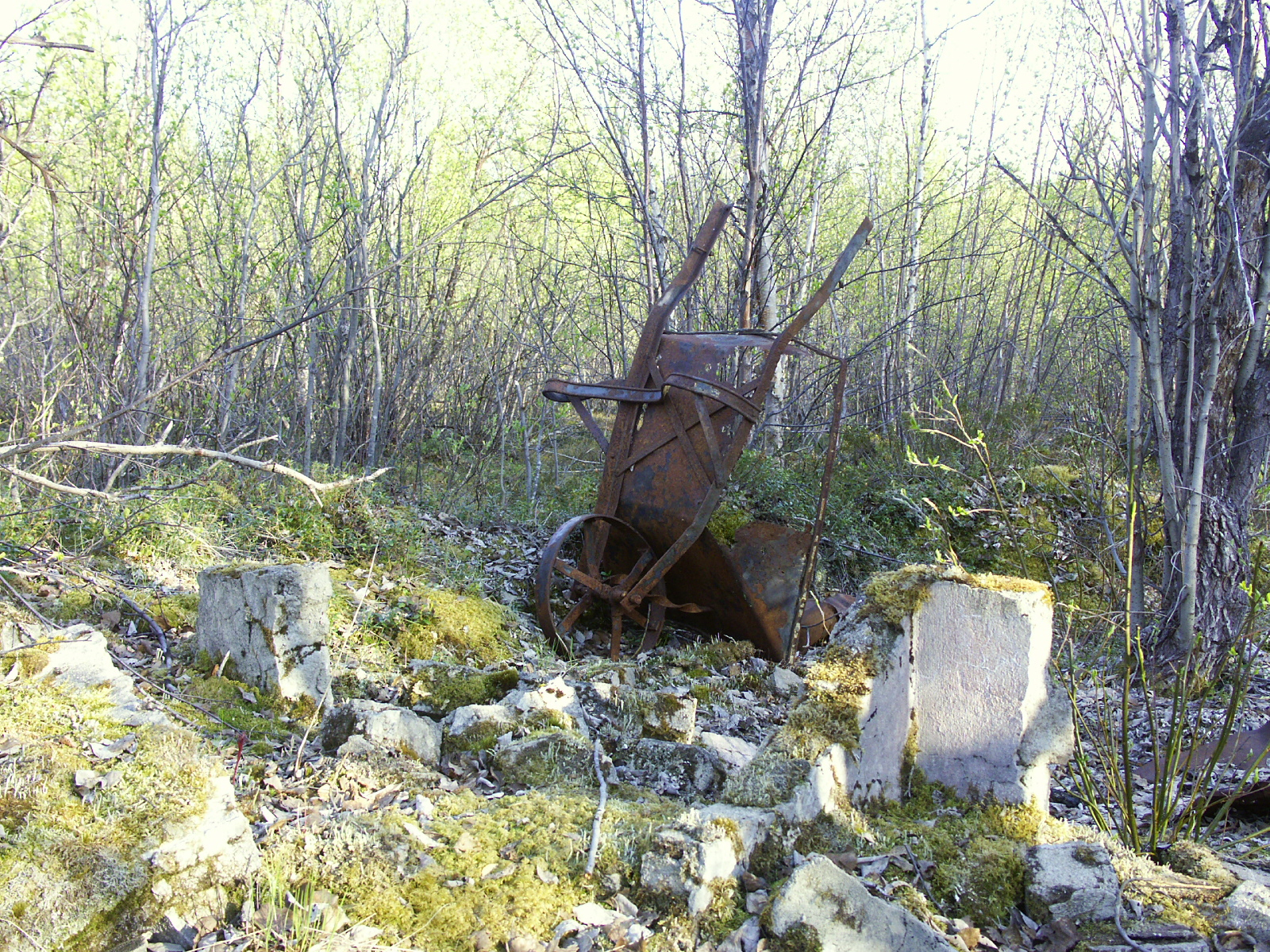 Wheelbarrow, Lazarettmoen WWII bombed German Field Hospital